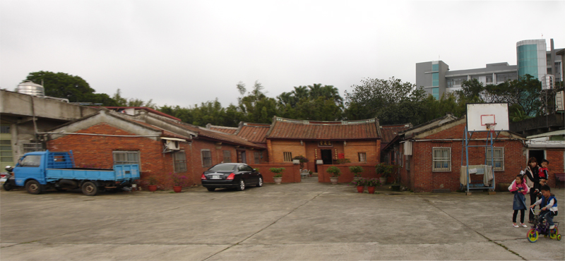 中文（台灣）: 楊梅「江夏堂」為傳統客家建築，係為為黃家來臺祖先所建造，在楊梅鎮上屹立百年，代表楊梅地區黃姓家族開拓楊梅的歷史見證。